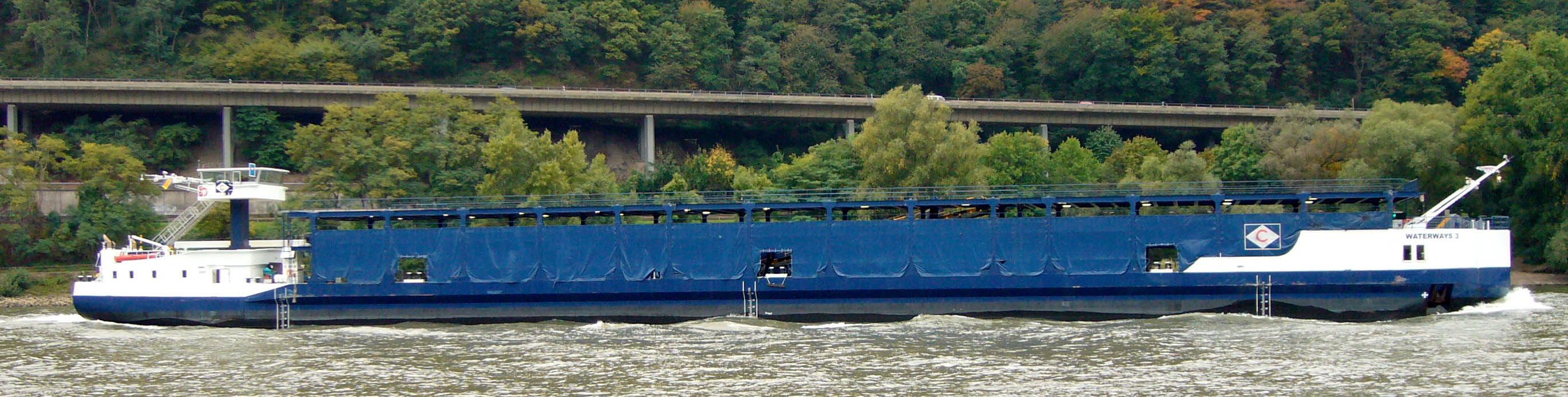 Autotransporter